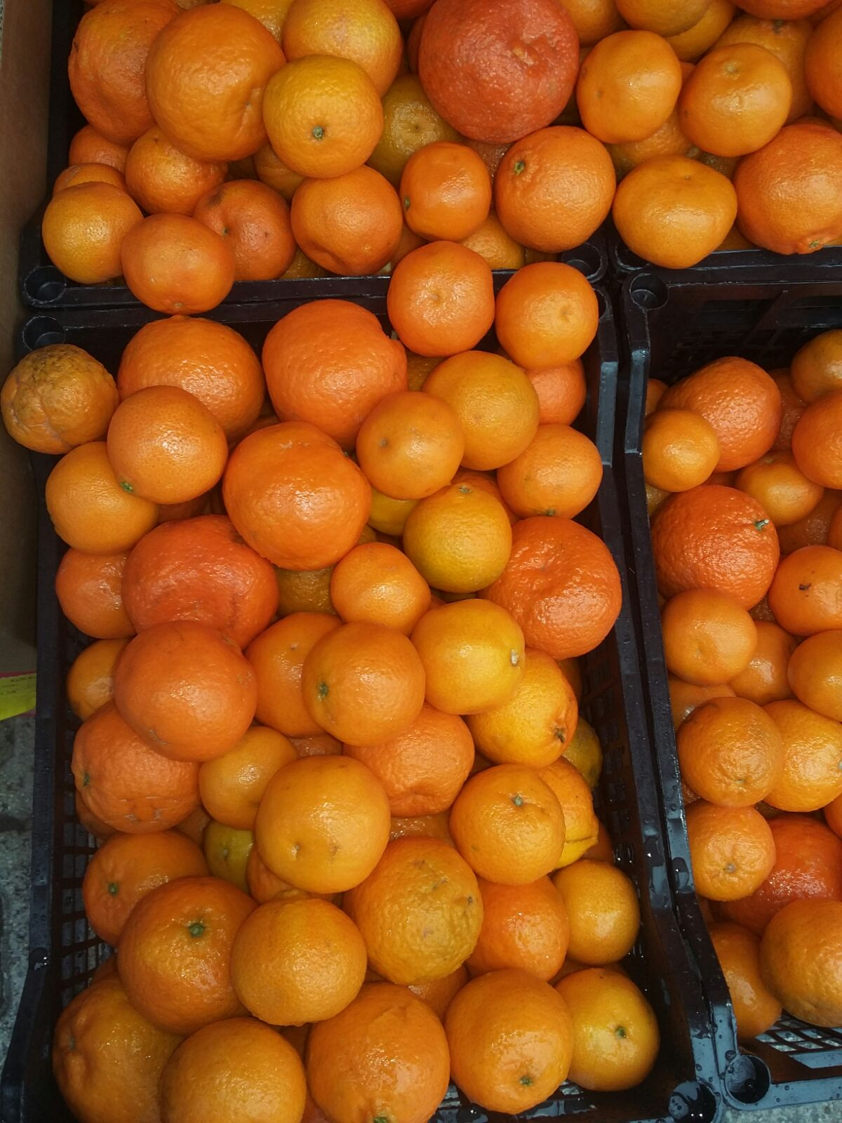 мандарине